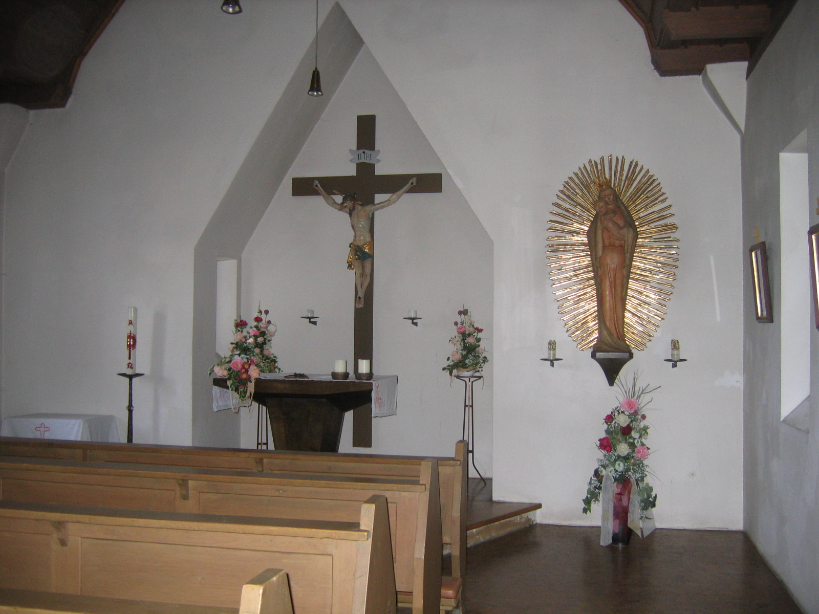 Das schmucke Innere des Kirchleins von Gietlhausen